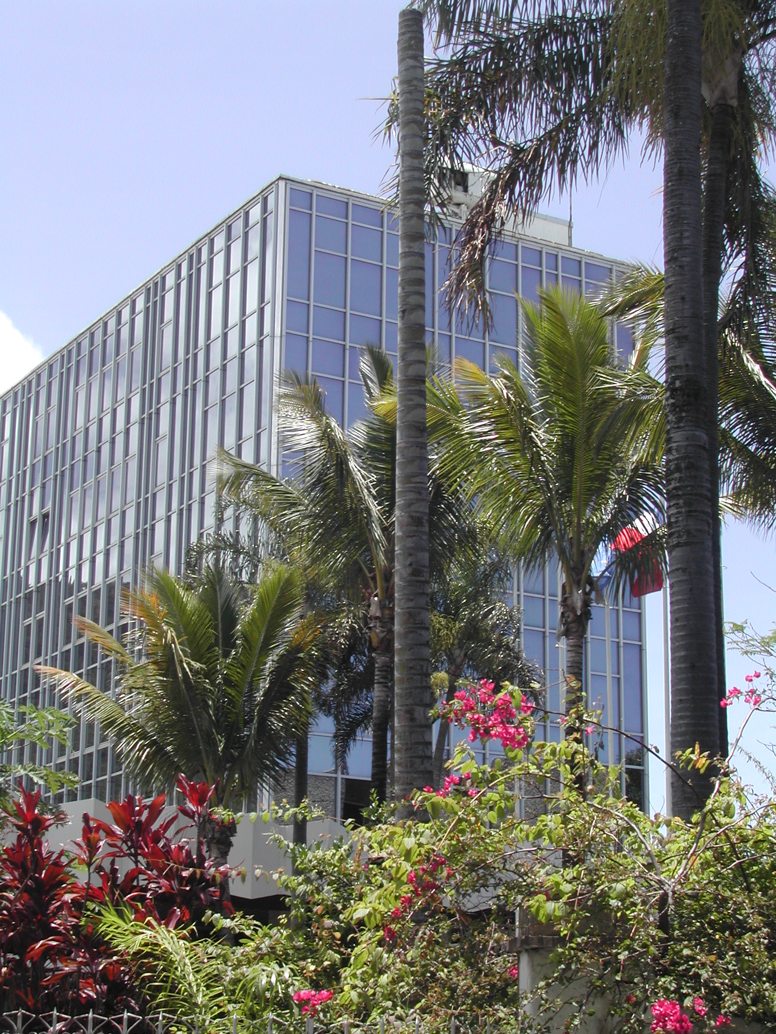 Photo d'un bâtiment du Palais de la Source à travers les grilles du Jardin de l'État à Saint-Denis de la Réunion.